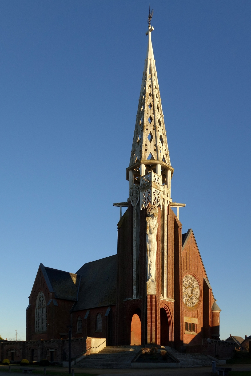 Eglise construite par Jean Charavel. 1925.